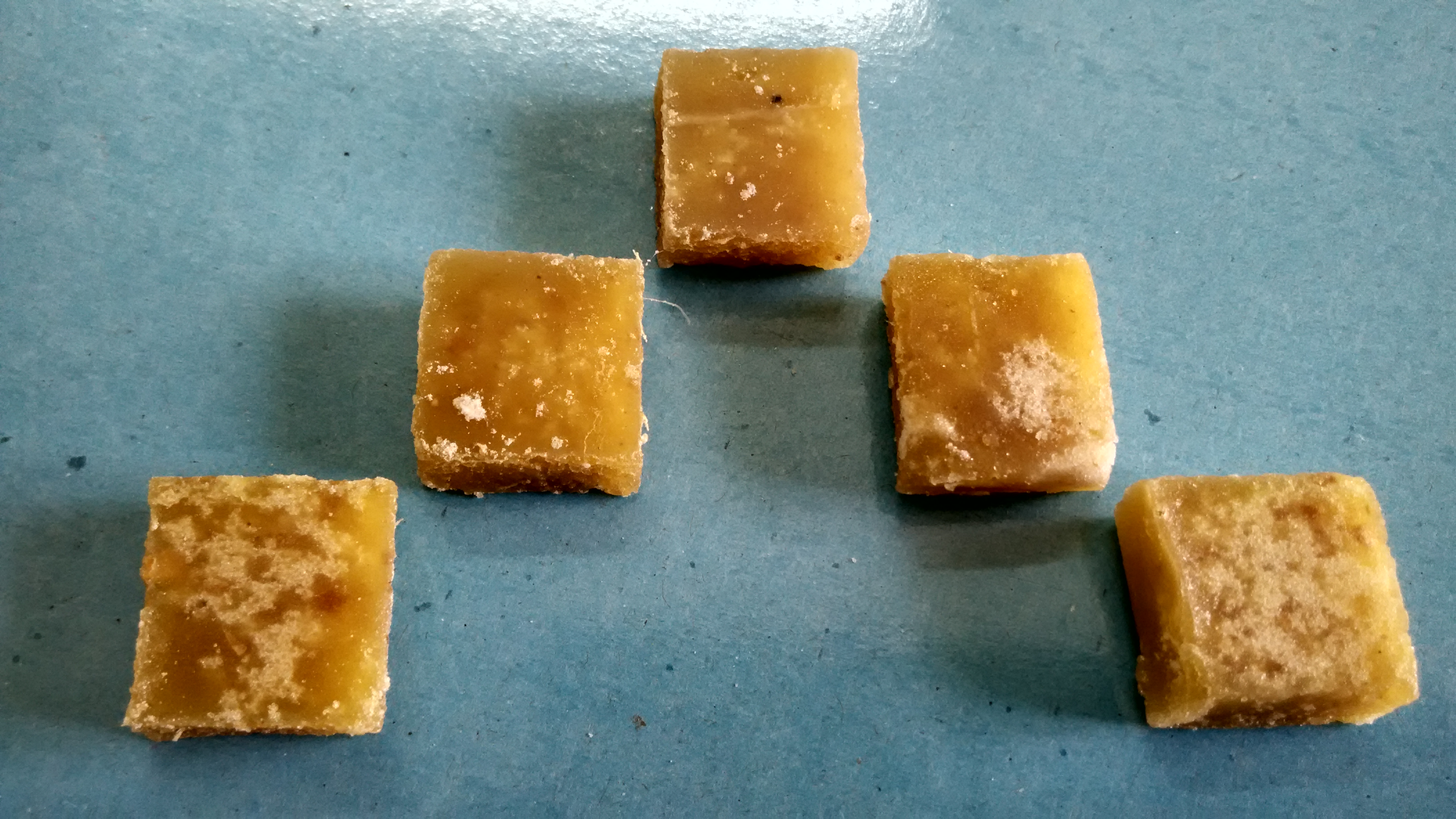 இஞ்சி முறப்பா.